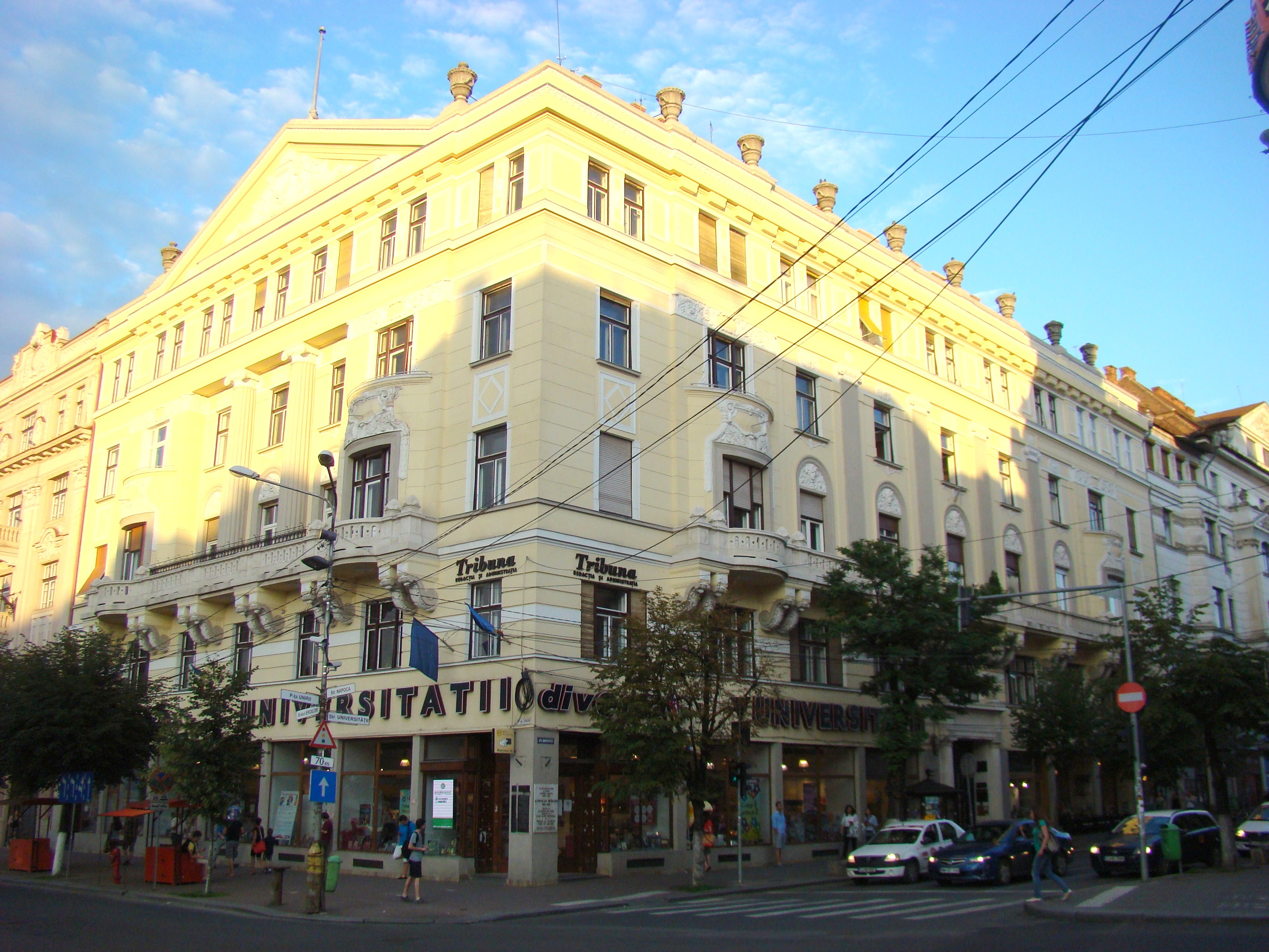 Palatul Sebestyen